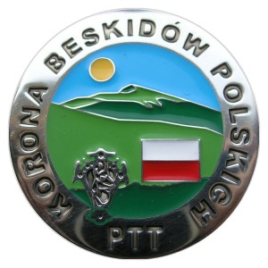 OKT PTT WKB PL